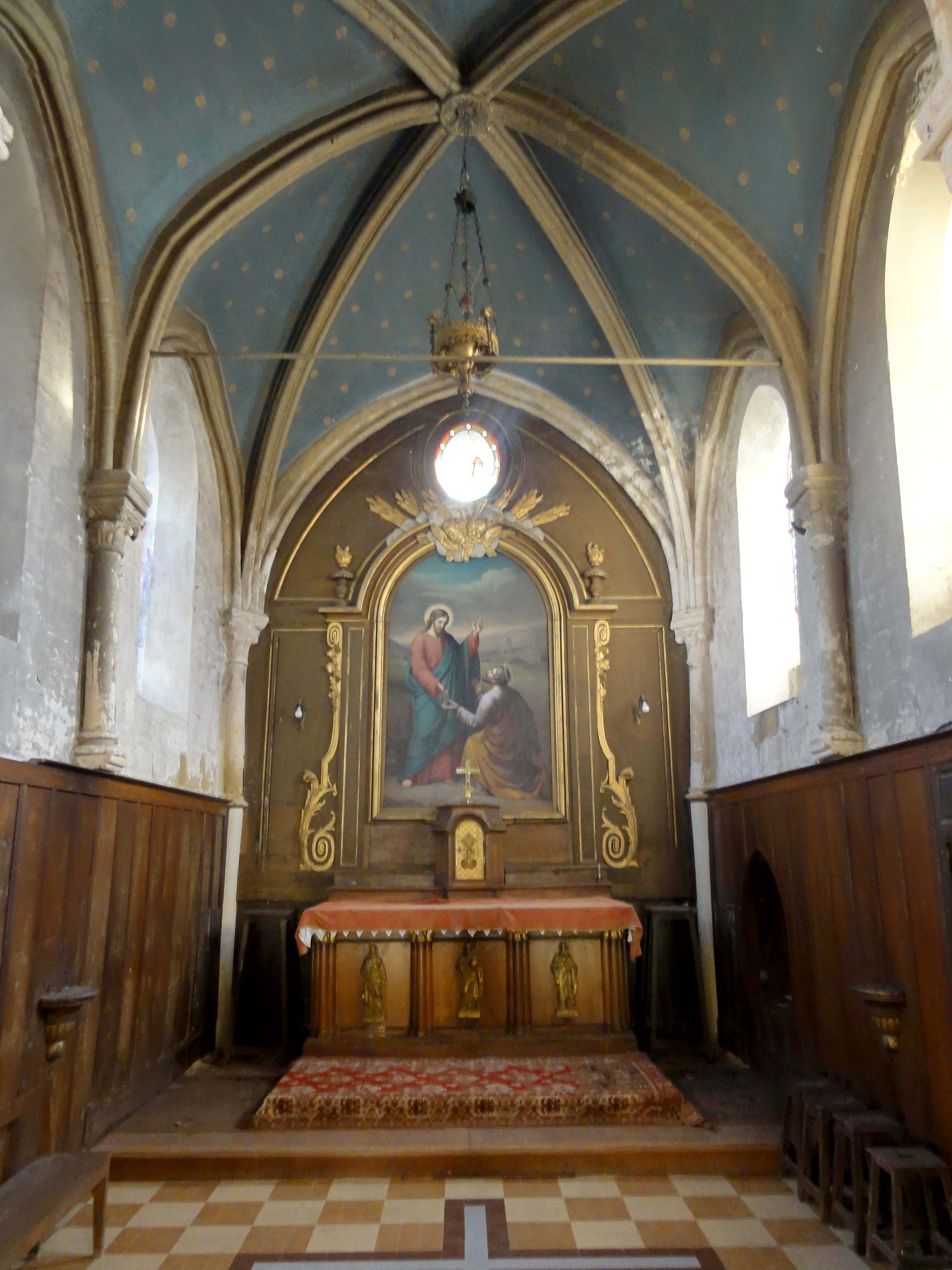 Intérieur de l'église - voir titre.